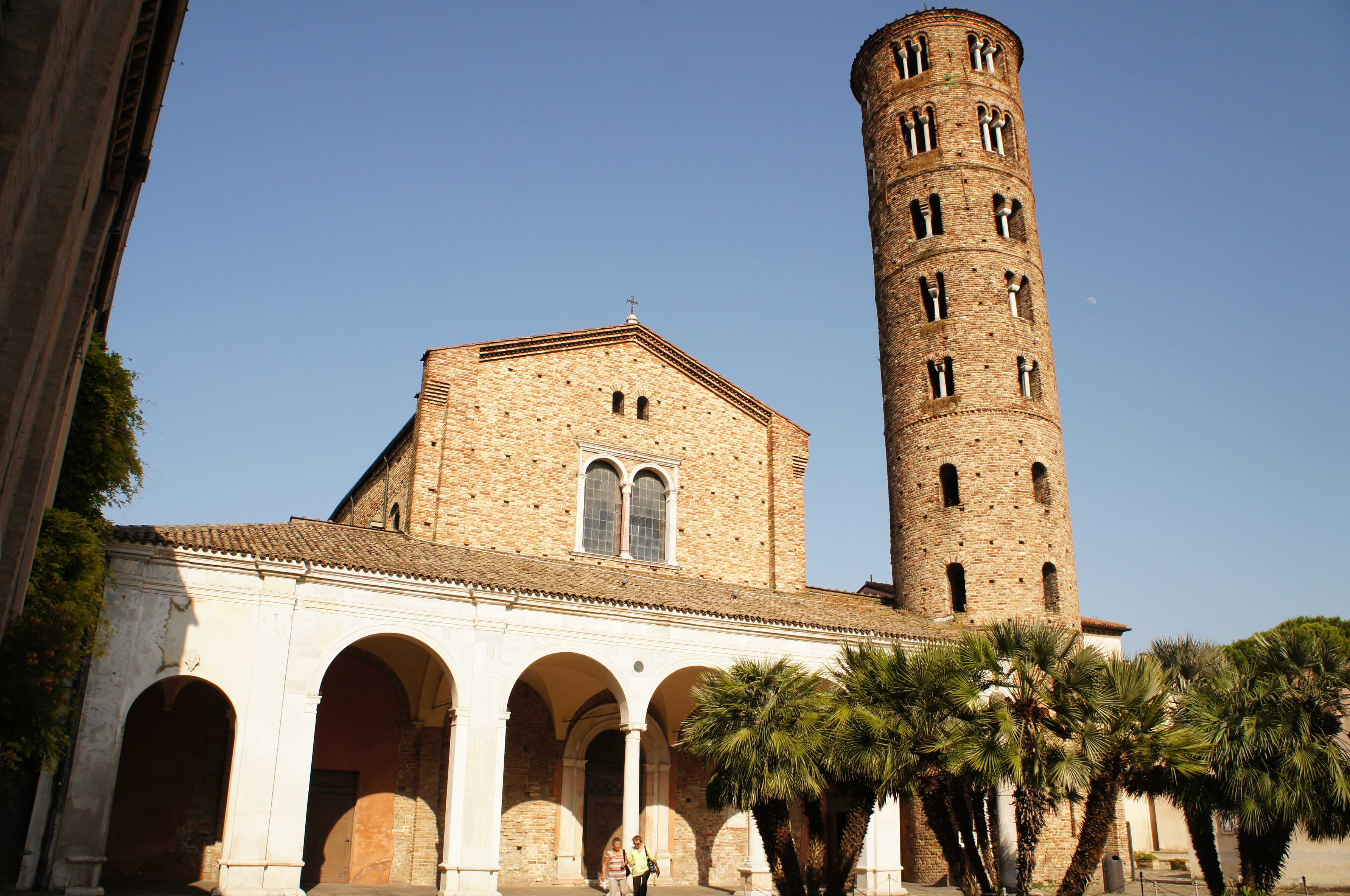 Sant'Apollinare Nuovo, Ravenna This is a photo of a monument which is part of cultural heritage of Italy.